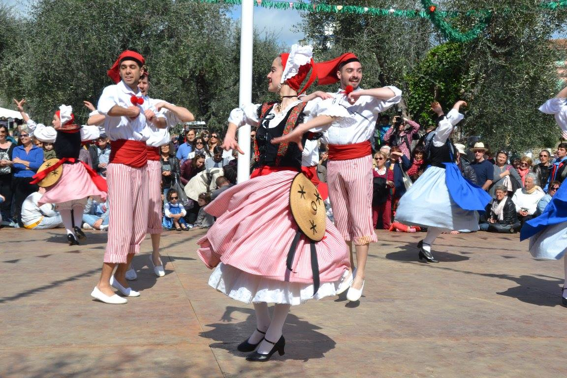 Danseurs en costume traditionnel niçois lors de la fête des Mai a Nice